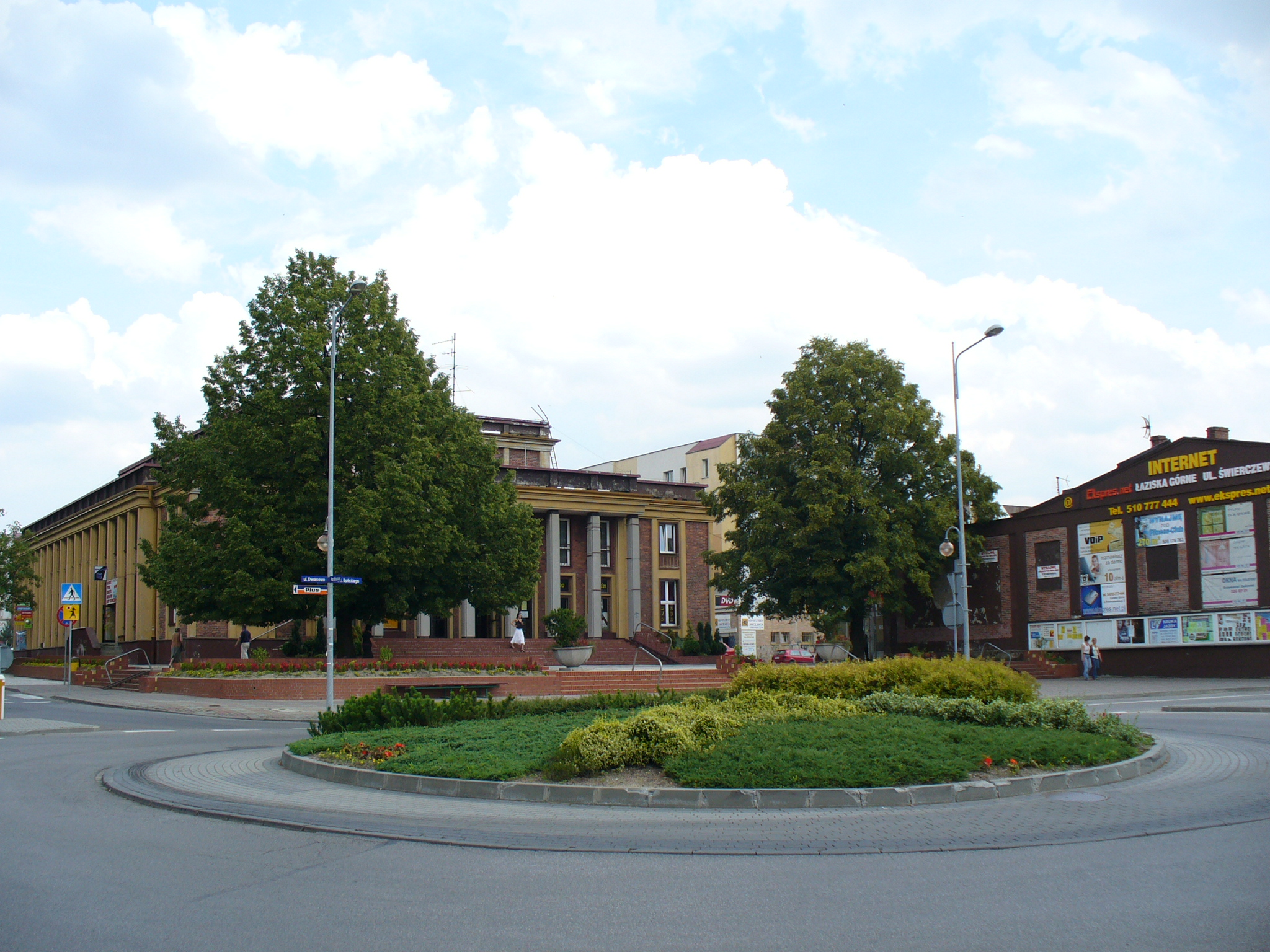 Ober Lazisk - Łaziska Górne. Rondo w centrum miasta, po lewej Miejski Dom Kultury